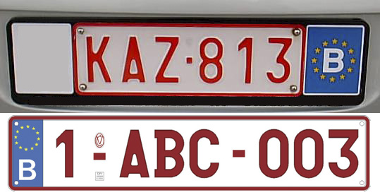 Belgian license plate and its plate holder